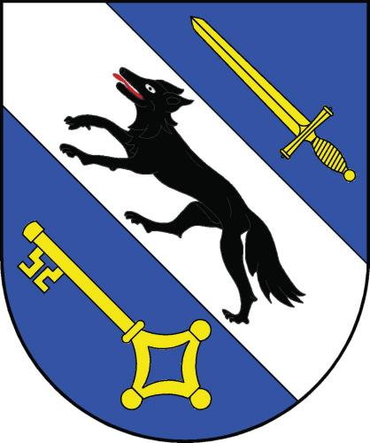 znak , Konecchlumí, okres Jičín